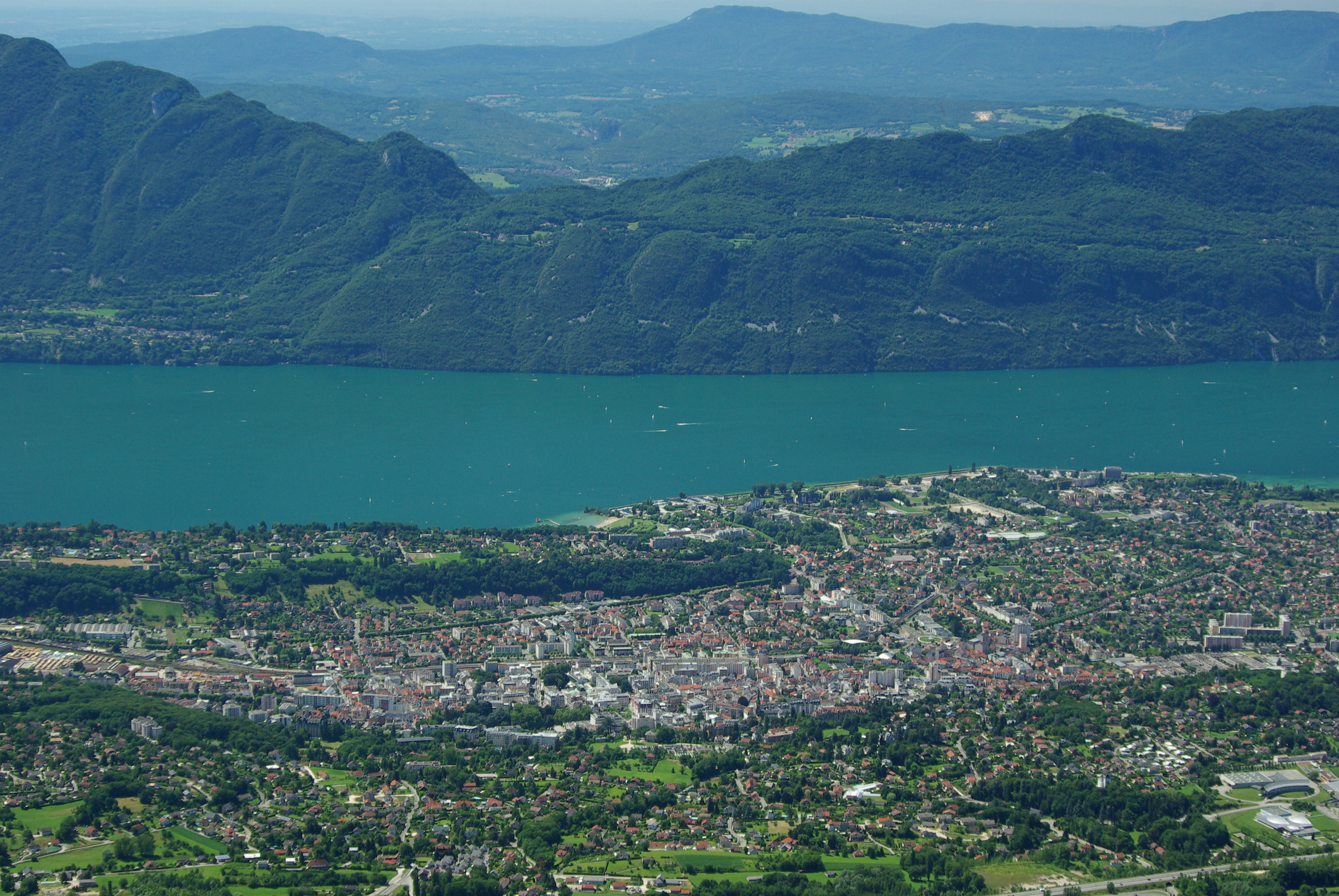 Le bassin aixois, le lac du Bourget et le massif de l’Épine depuis le mont Revard.